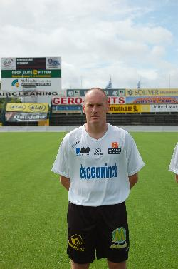 Frederik Vanderbiest